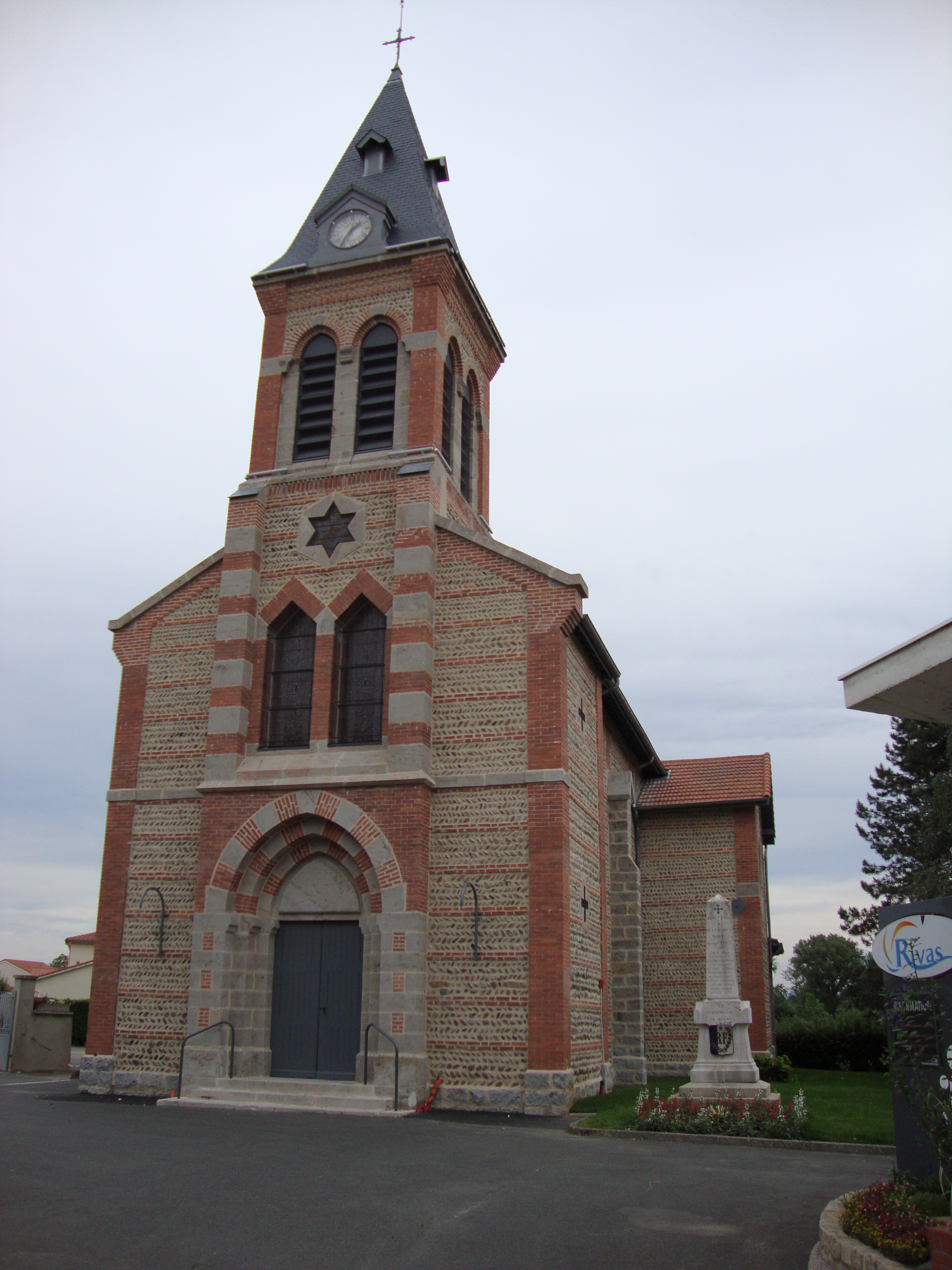 Rivas (Loire, Fr) église, façade.